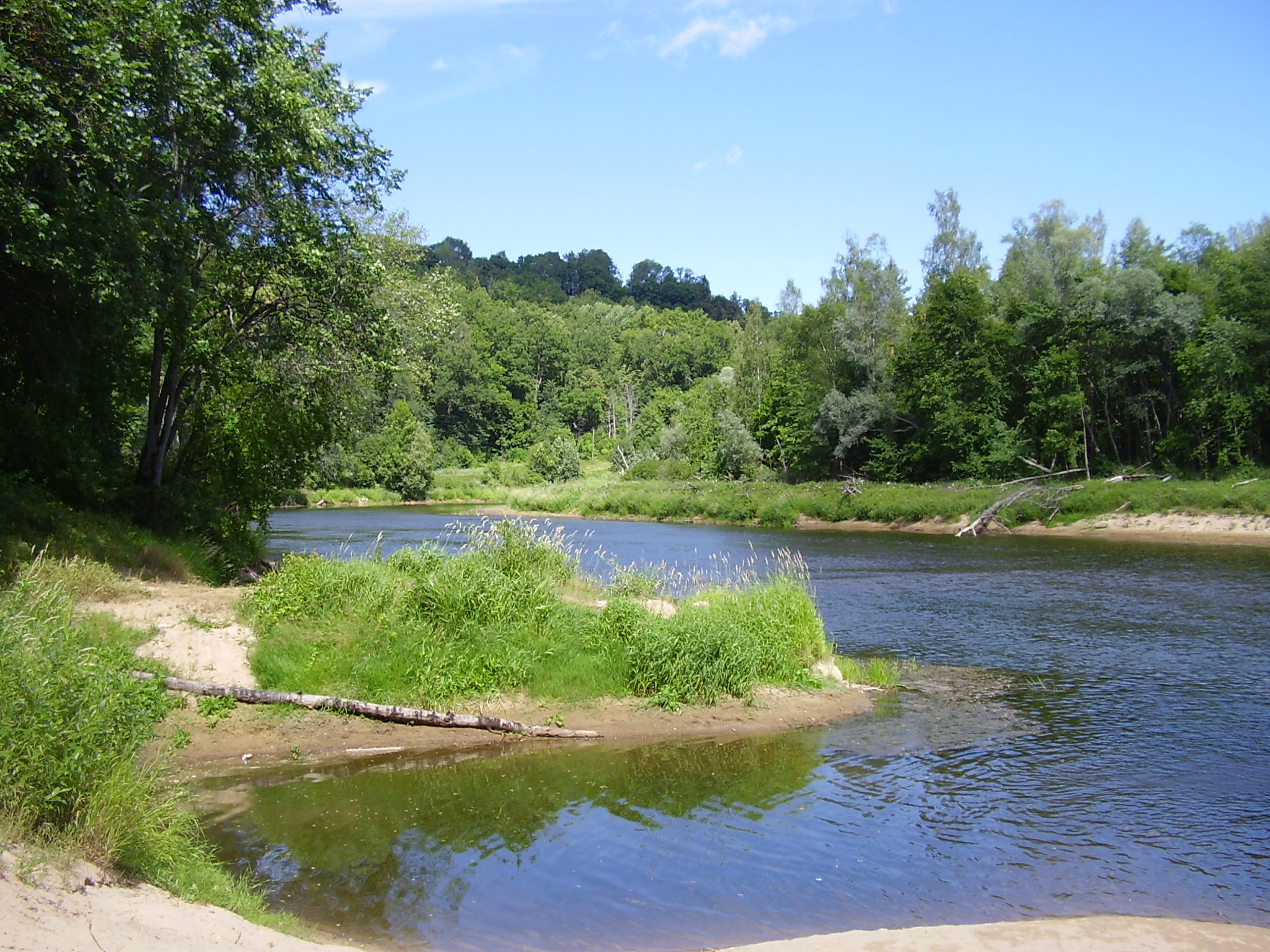 La rivière Gauja au niveau de Sigulda.